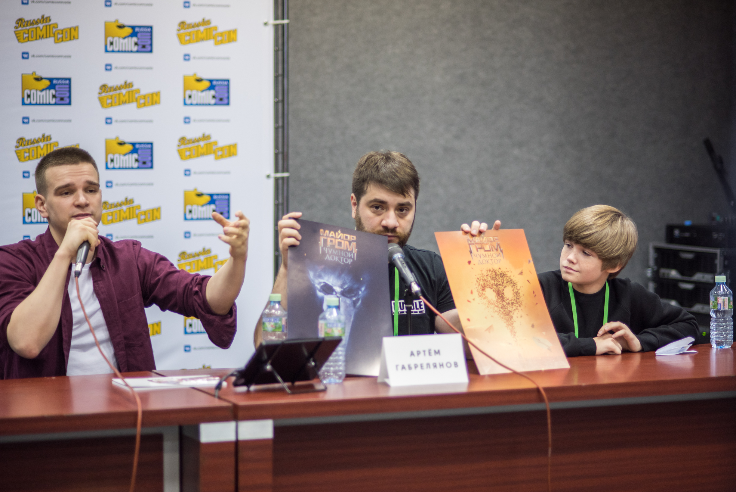 Владимир Беседин, Артём Габрелянов с постерами и Олег Чугунов. Презентация фильма «Майор Гром. Чумной Доктор»